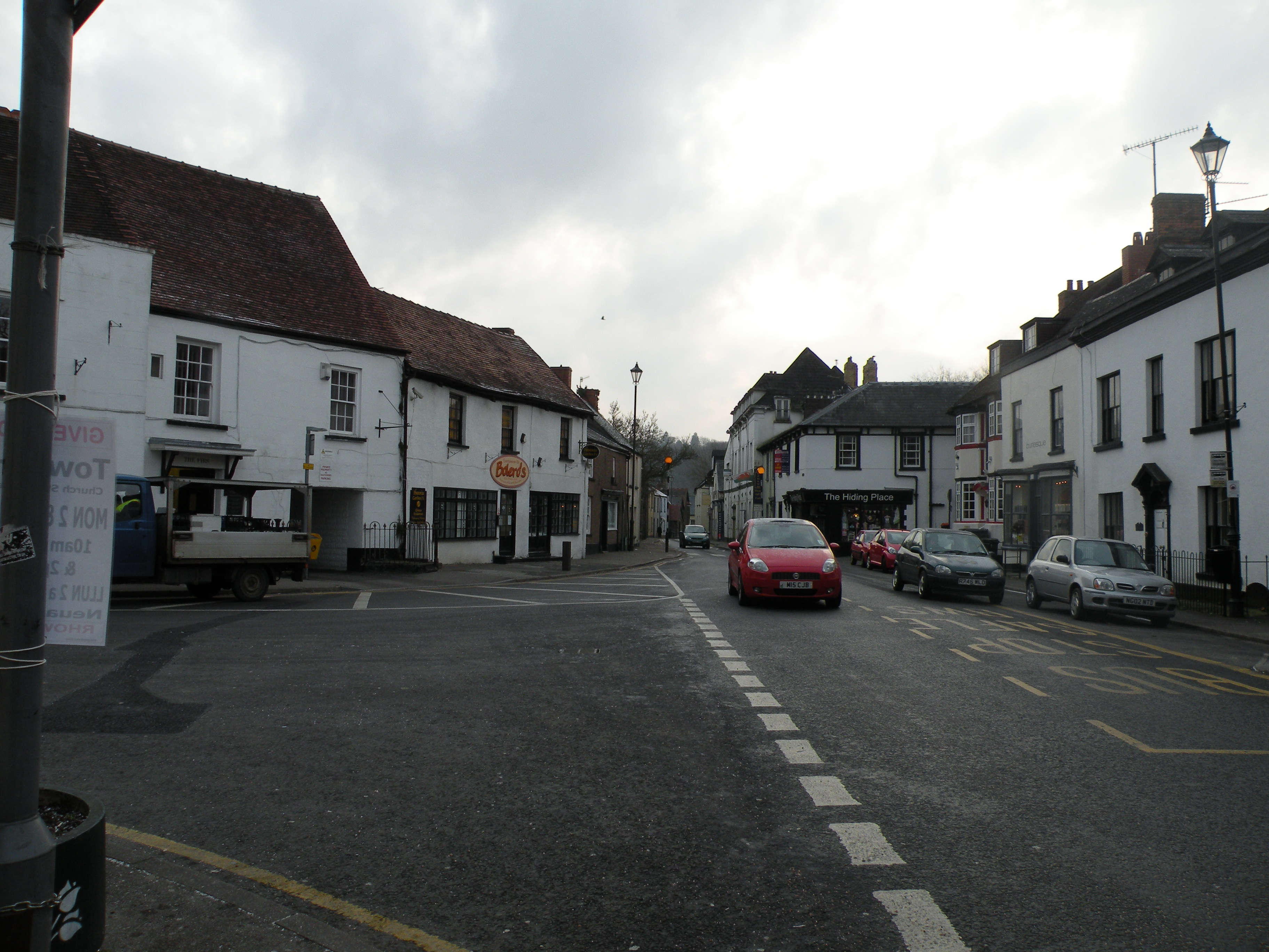 rue de caerleon, pays de galles